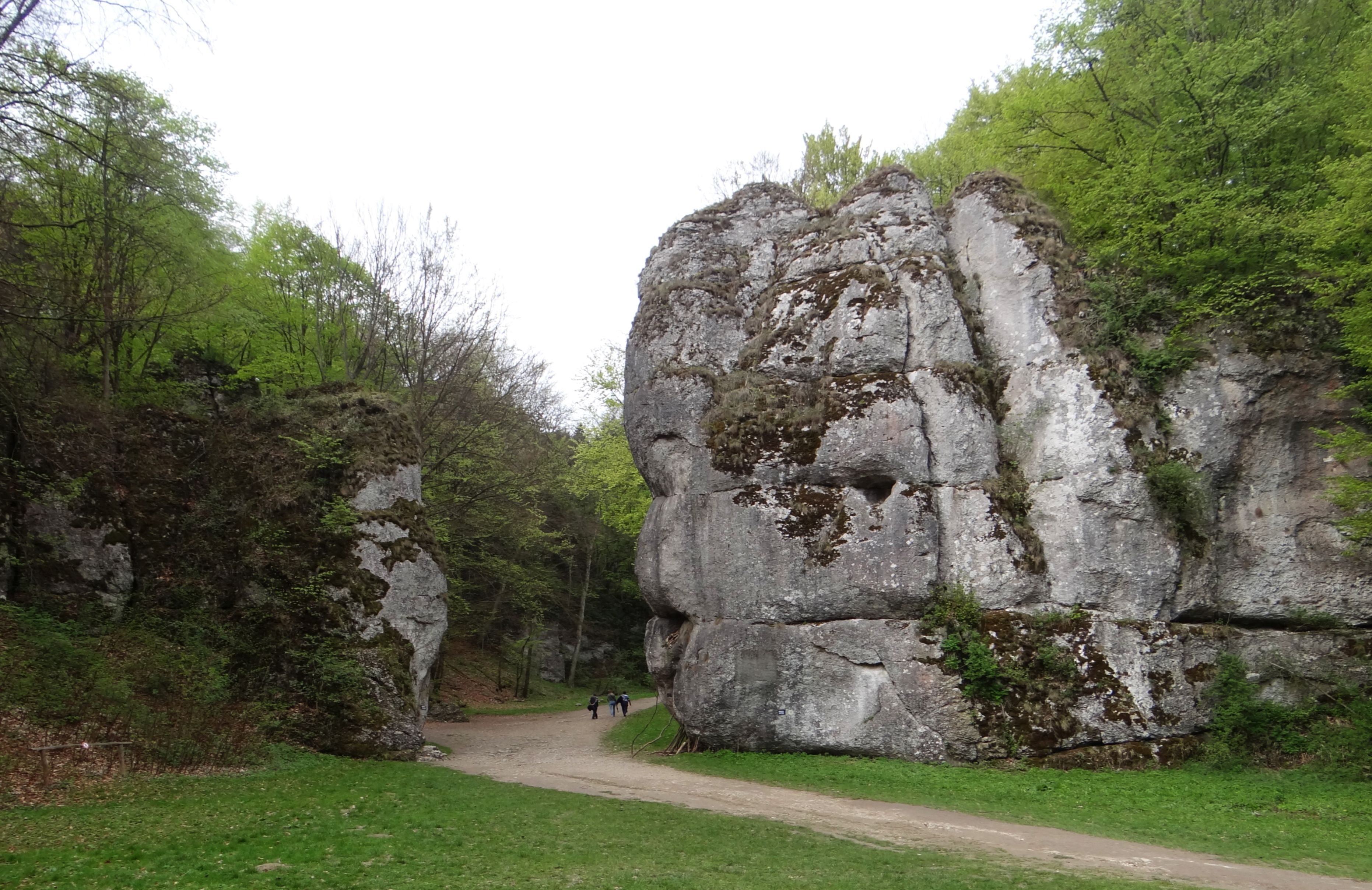 Brama Krakowska w Ojcowskim Parku Narodowym